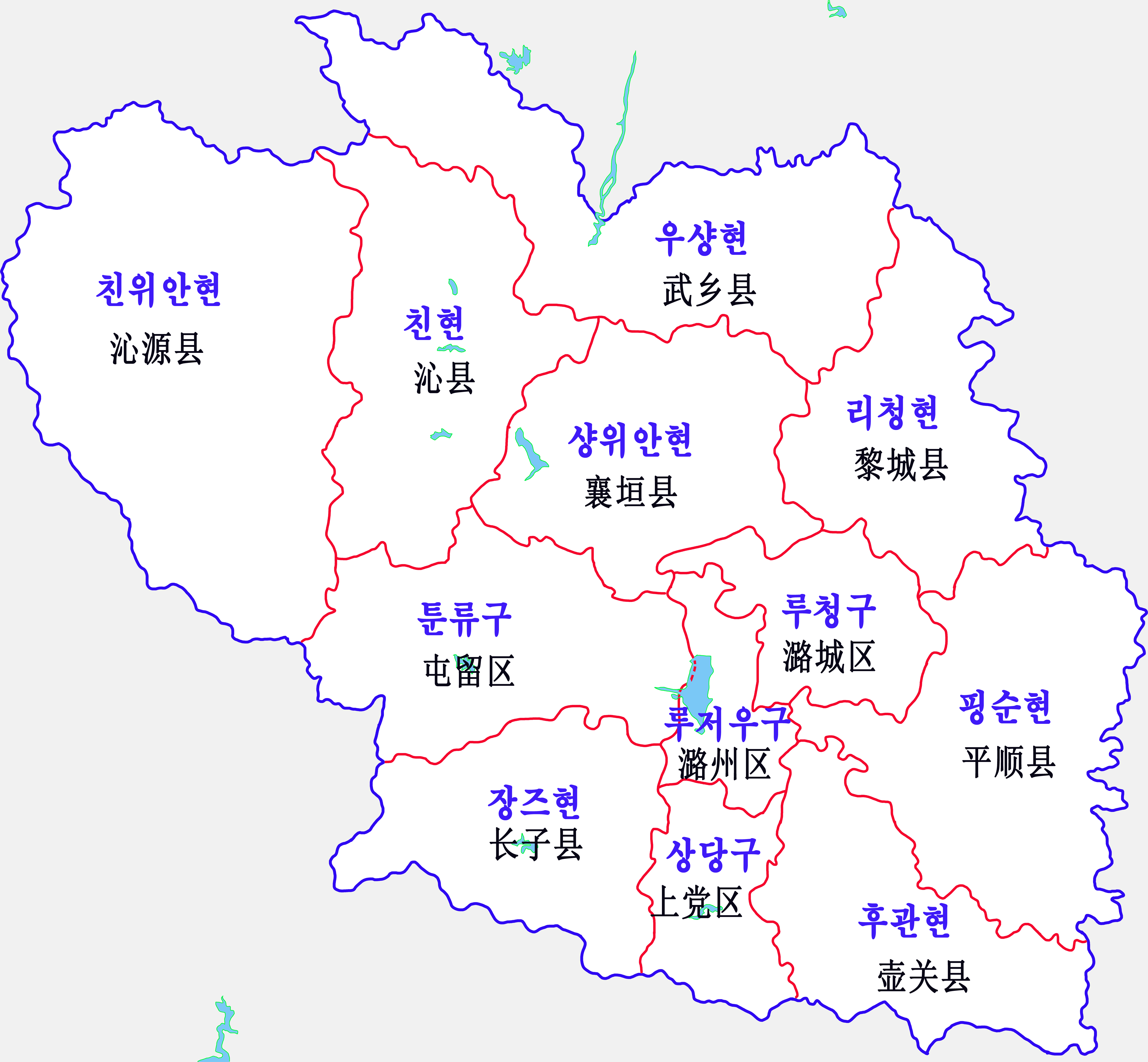 창즈시지도